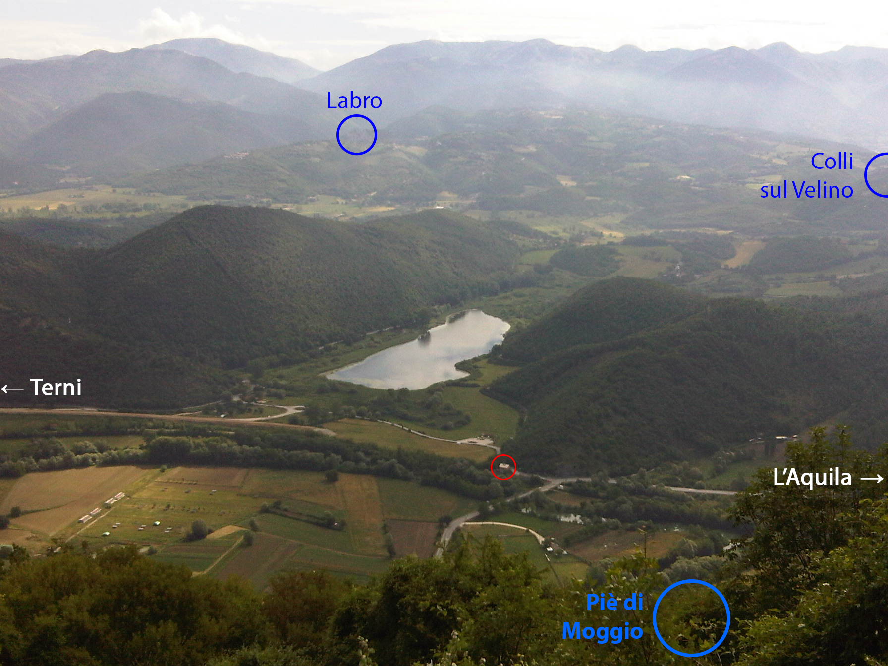 La fermata ferroviaria di Labro-Moggio (cerchiata in rosso), sulla linea Terni-Rieti-L'Aquila, fotografata dal paese di Moggio. In blu sono cerchiati gli altri centri abitati serviti dalla stazione: Piè di Moggio (coperto dalle foglie), Labro, Colli sul Velino